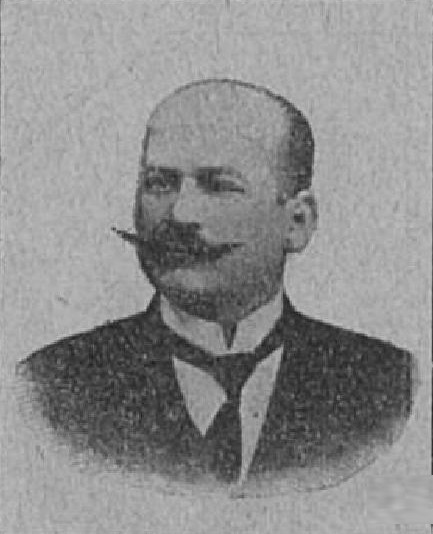 Jan Zimmer (1858-1938), rakouský a český advokát a politik